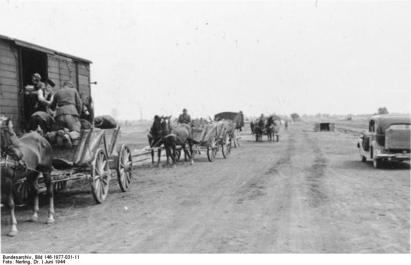 Pleskau Verladen der Bücher und Ikonen. Juni 1944 Film 135/19 Information added by Wikimedia users.